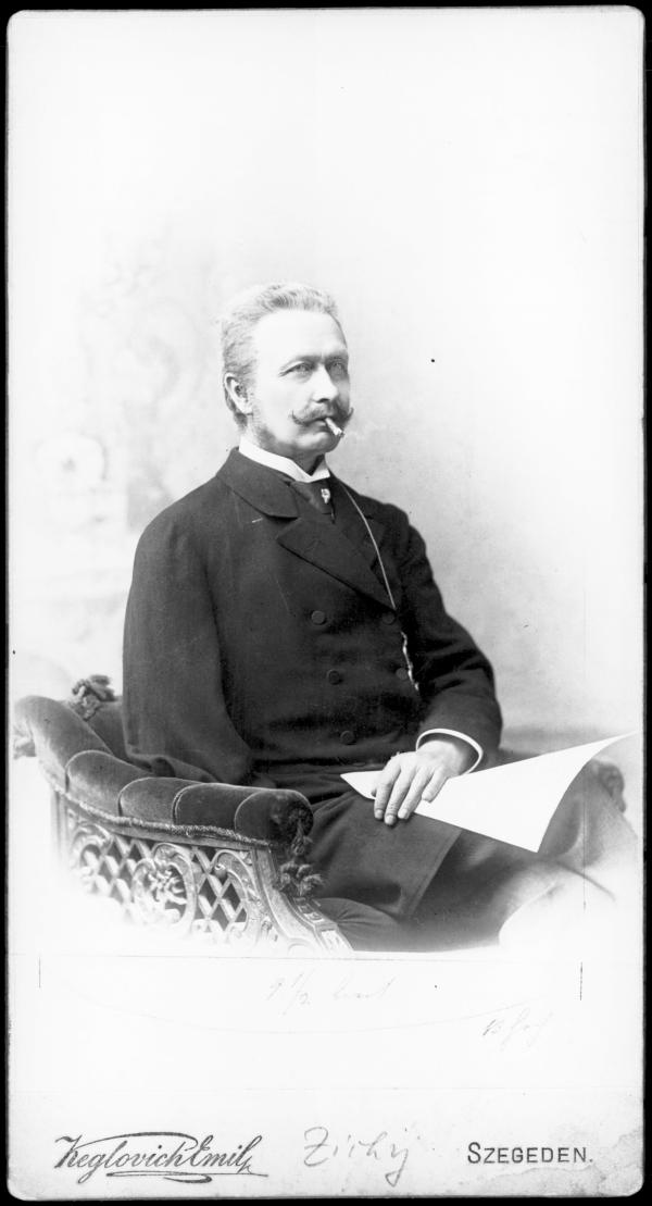 Der ungarische Komponist und Pianist Géza Zichy (1849-1924)